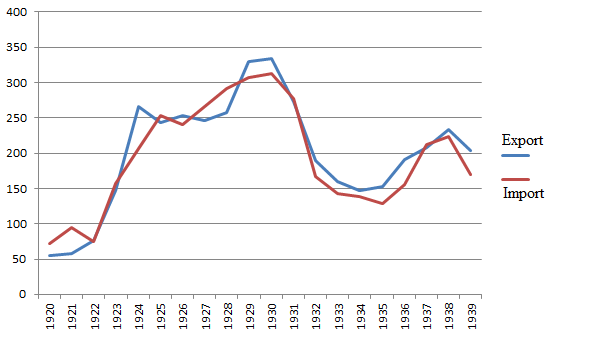 Lietuvos importo ir eksporto balansas 1920 m. - 1939 m.